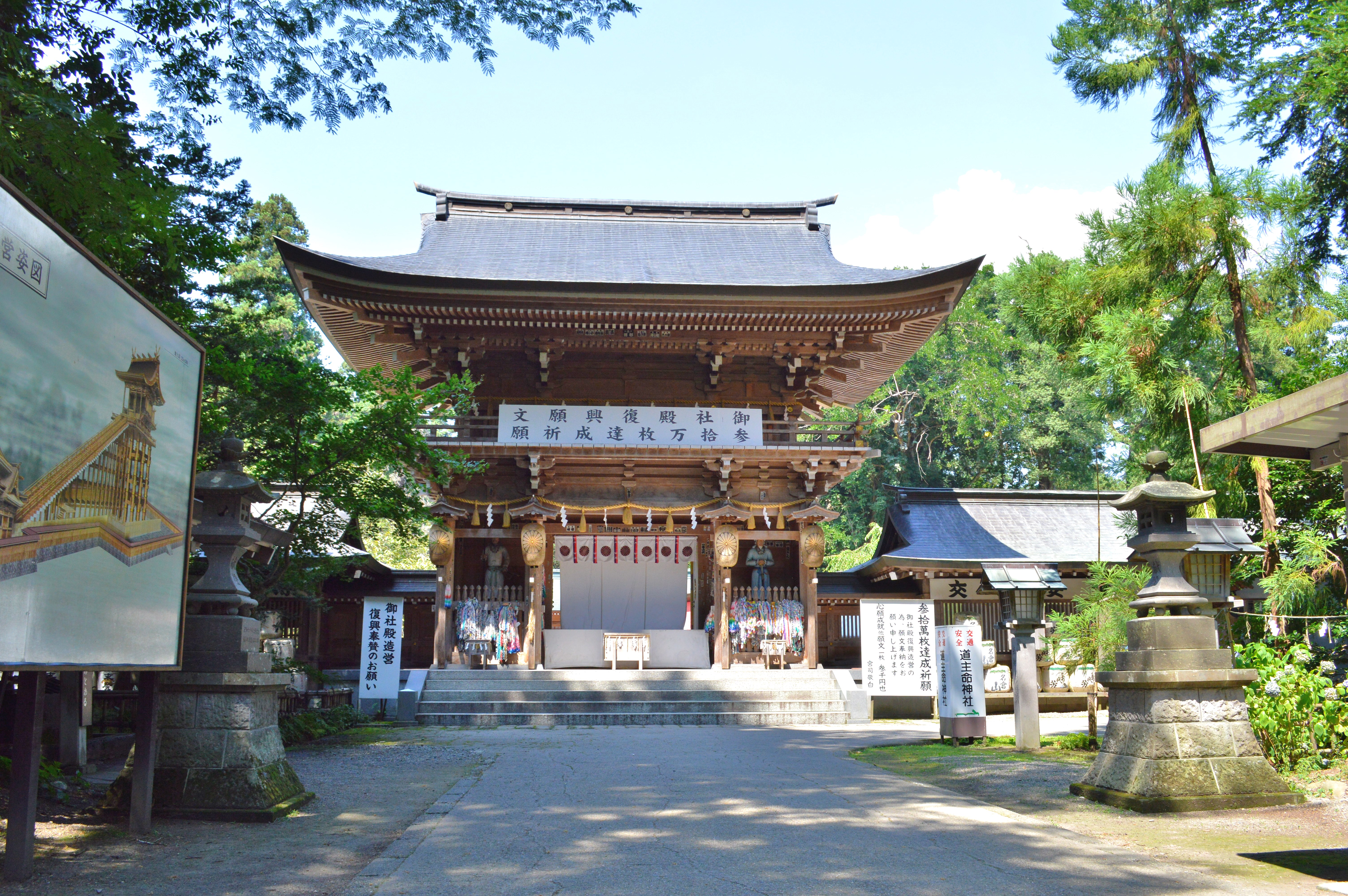 伊佐須美神社 楼門